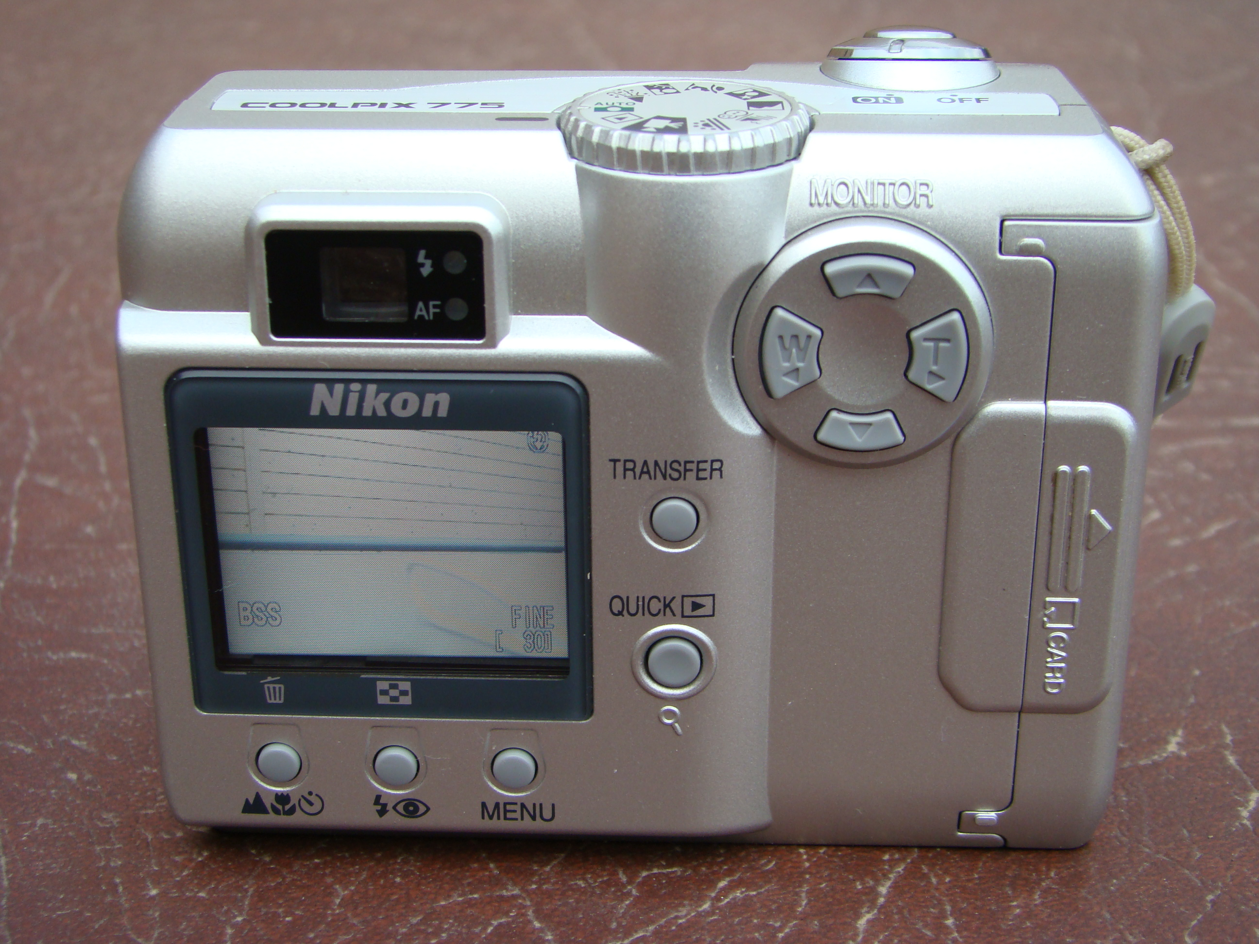 Nikon Coolpix 775 vue arrière